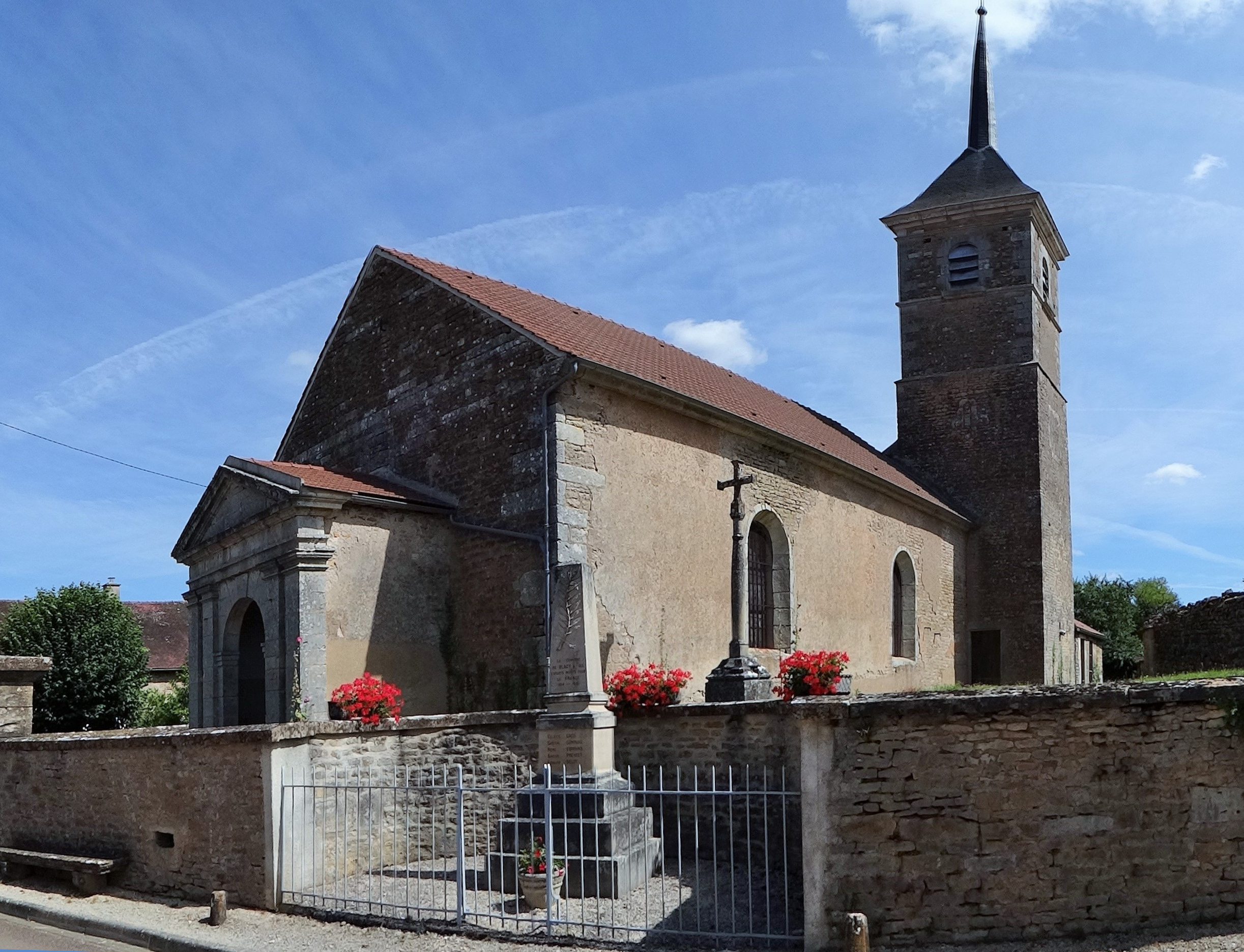 Église de Blacy